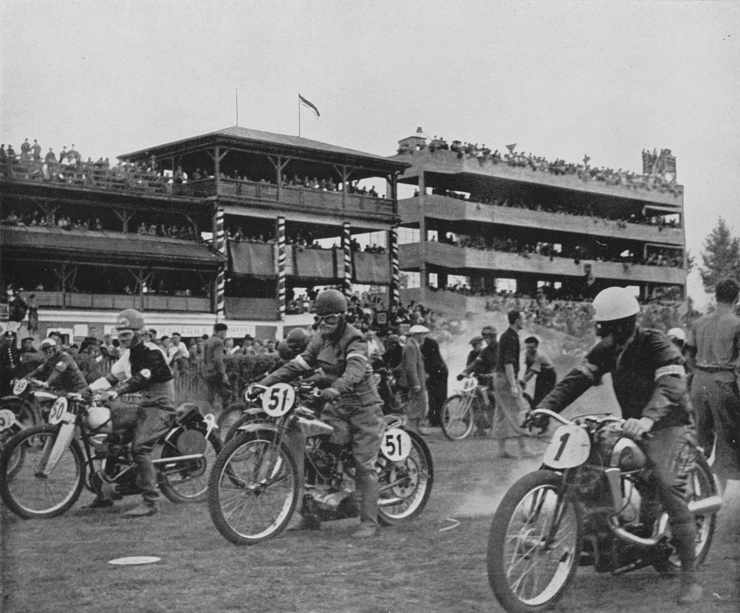 Pardubice, Závod o Zlatou přílbu